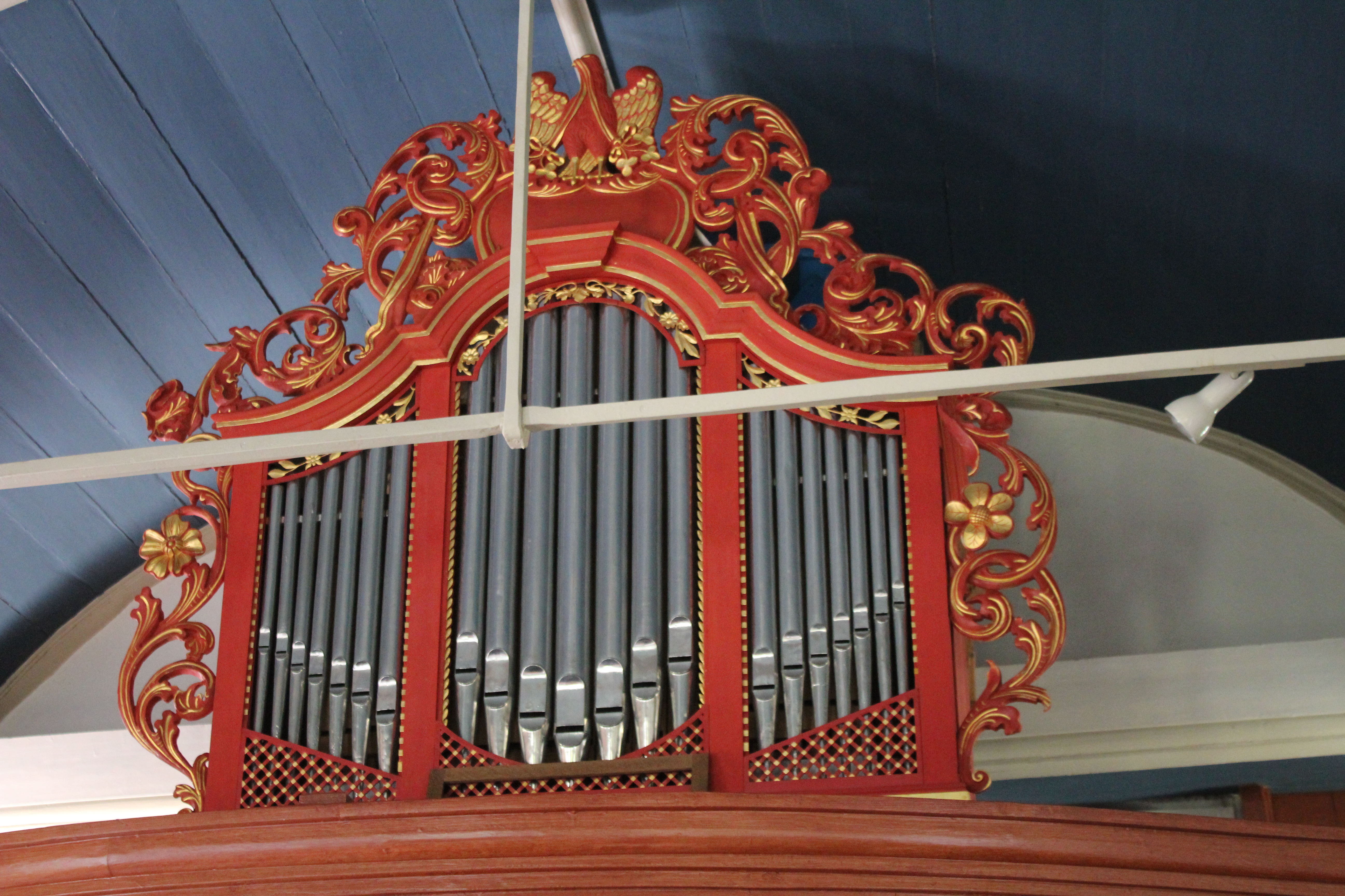 Ev.-reformierte Kirche Böhmerwold, Gemeinde Jemgum, Landkreis Leer, Ostfriesland, Deutschland